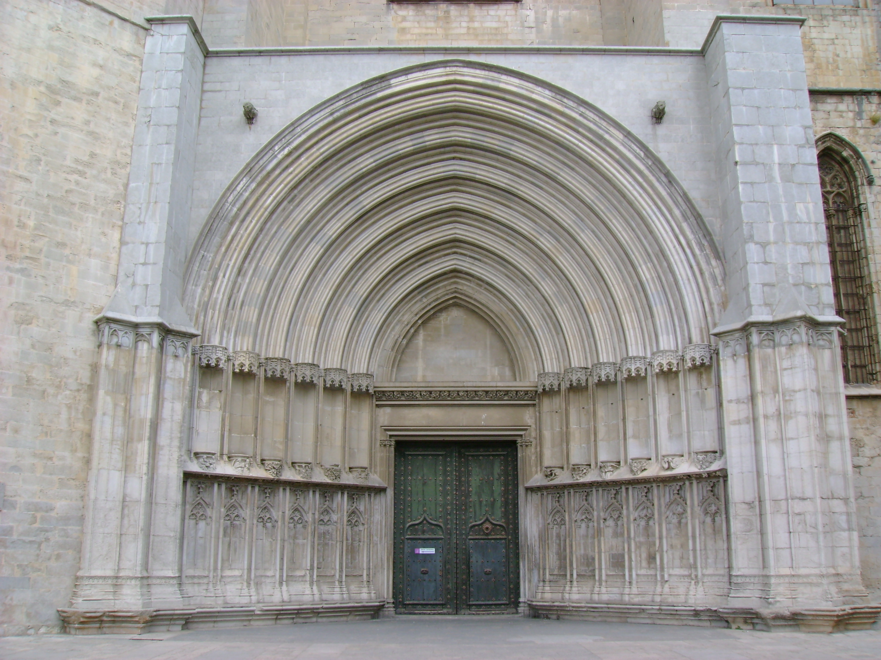 Portada de los Apóstoles de la Catedral de Gerona.